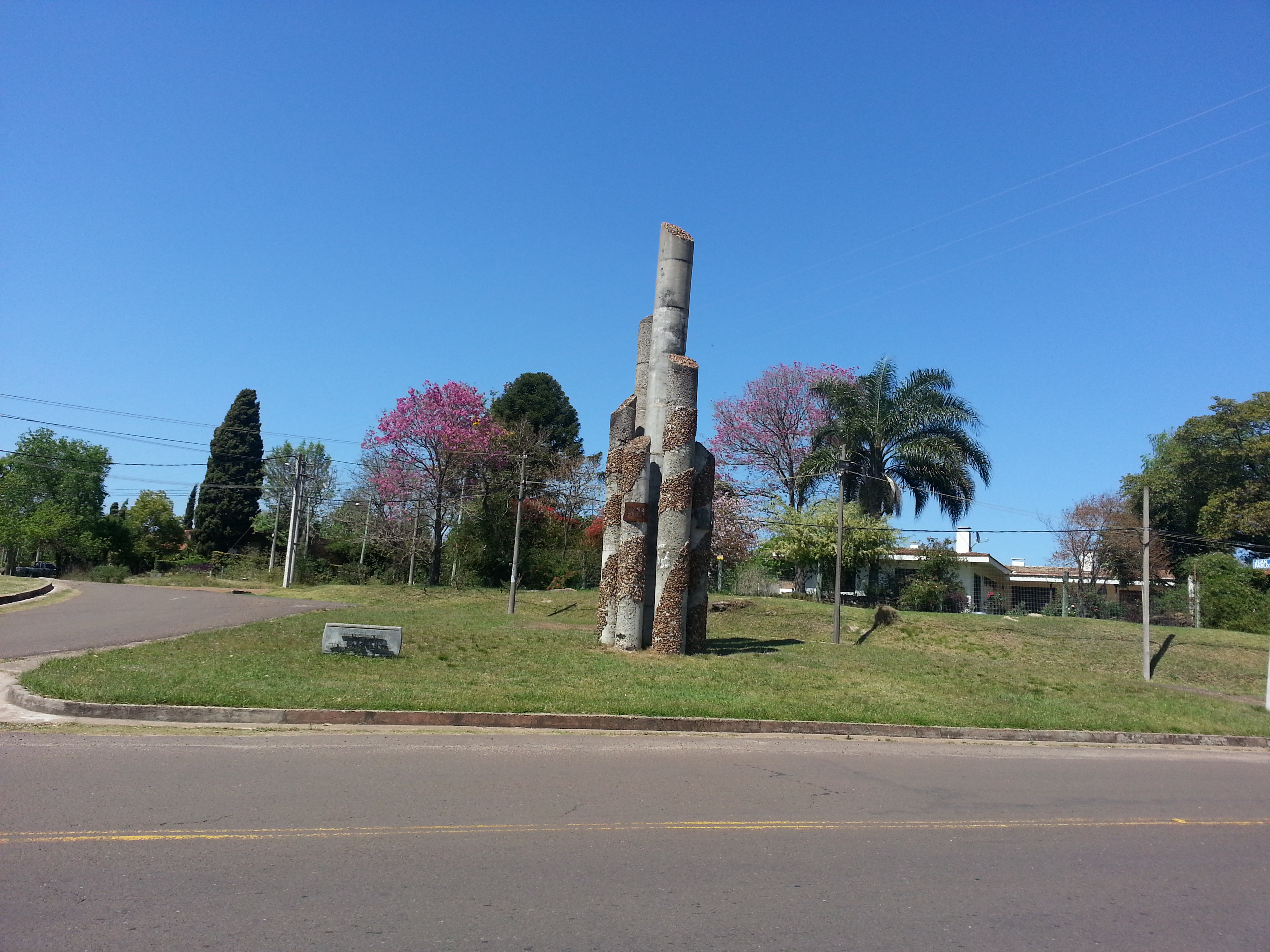 Ubicado en Costanera Sur.